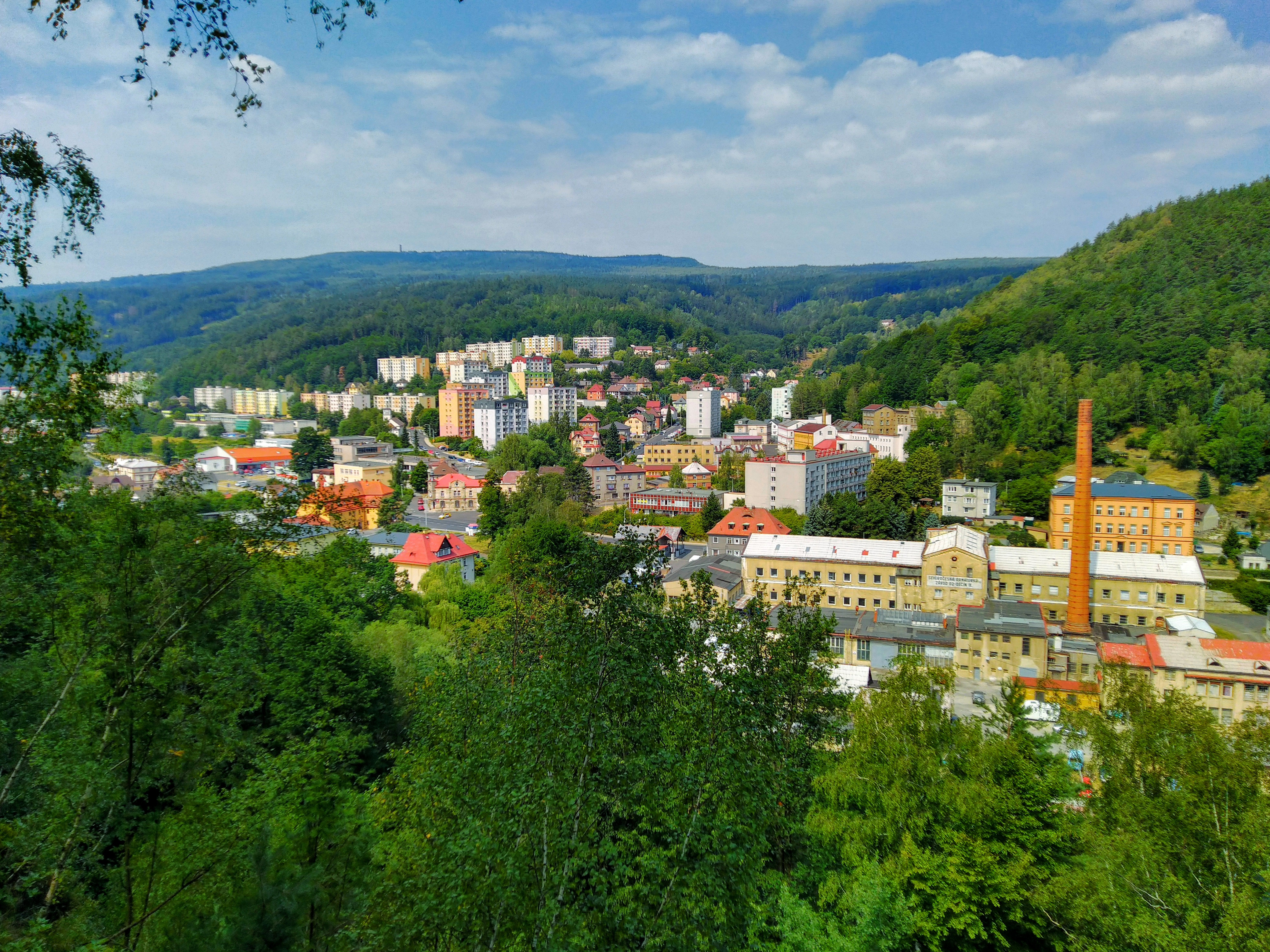 Pohled na Děčín-Bynov z jihovýchodního směru. V pozadí Děčínský Sněžník.